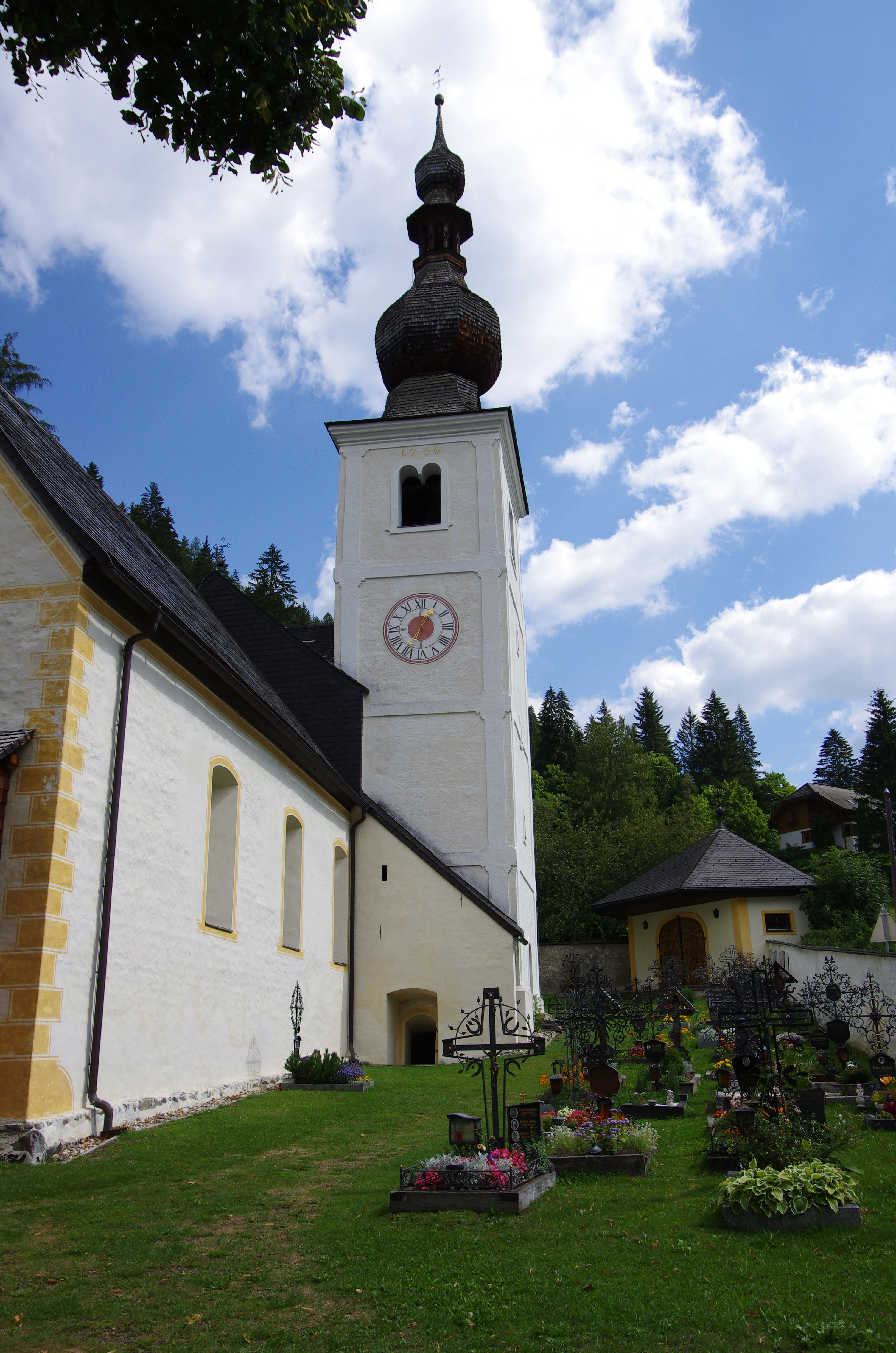 Kath. Pfarrkirche hl. Georg